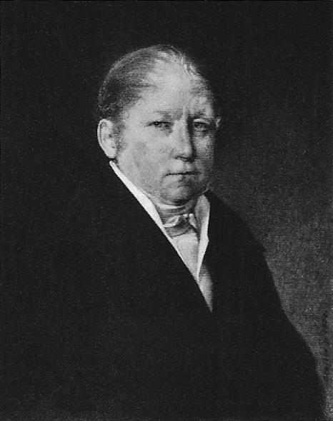 Christian Binder [Hofrat, Numismatiker] (Elfenbeinminiatur 105×84 mm)